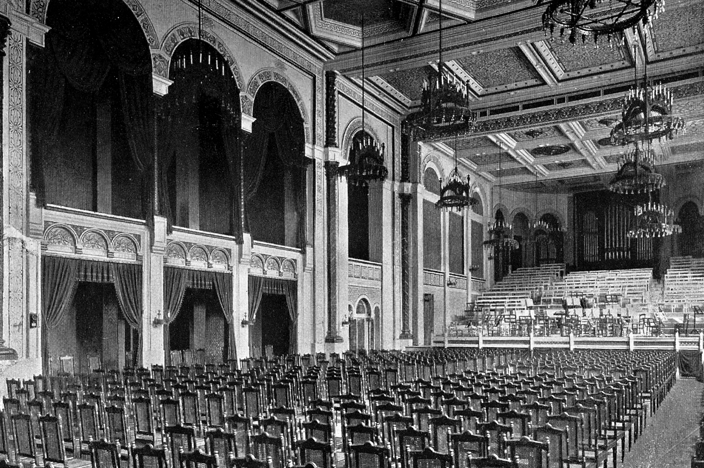 Der große Kur- bzw. Konzertsaal der Neuen Redoute in Aachen, erbaut von W. Wickop